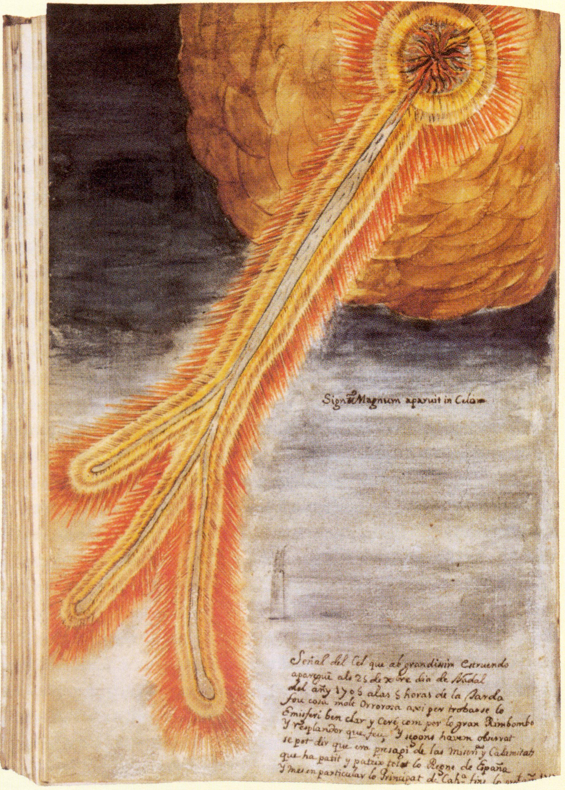 Metorit_caigut_damunt_Terrassa_el_1704. El dia de Nadal del 1704 un gran llum va aparèixer al cel de Catalunya. Es tractava d’un meteorit d’un quilogram de tipus rocós que es va estavellar prop de Catalunya. Fou recollit a la Miscel·lània Científica de Josep Bolló, que va fer el dibuix descrivint-lo com Signe Magnut aparuit in Cel Señal del Cel que ab grandissim estruendo aparegué als 25 de desembre, dia de Nadal, del añy 1705 alas 5 horas de la tarda. Fou cosa molt orrorosa axi per trobarse lo Emisferi ben clar y ceré com per lo gran rimbombo y resplandor que feu. Y segons havem observat se pot dir que era presagi de las miseries y calamitats que ha patit i pateix tot lo Regne de España y mes en particular lo Principat de Cathalunya.